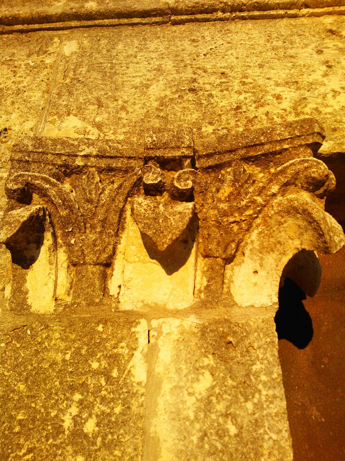 chiesa di Santa Maria di Cea Dettaglio capitello This is a photo of a monument which is part of cultural heritage of Italy.